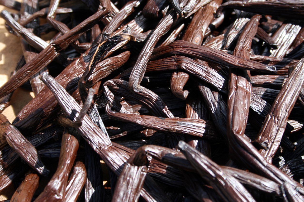 Sechage de vanille à Raiatea